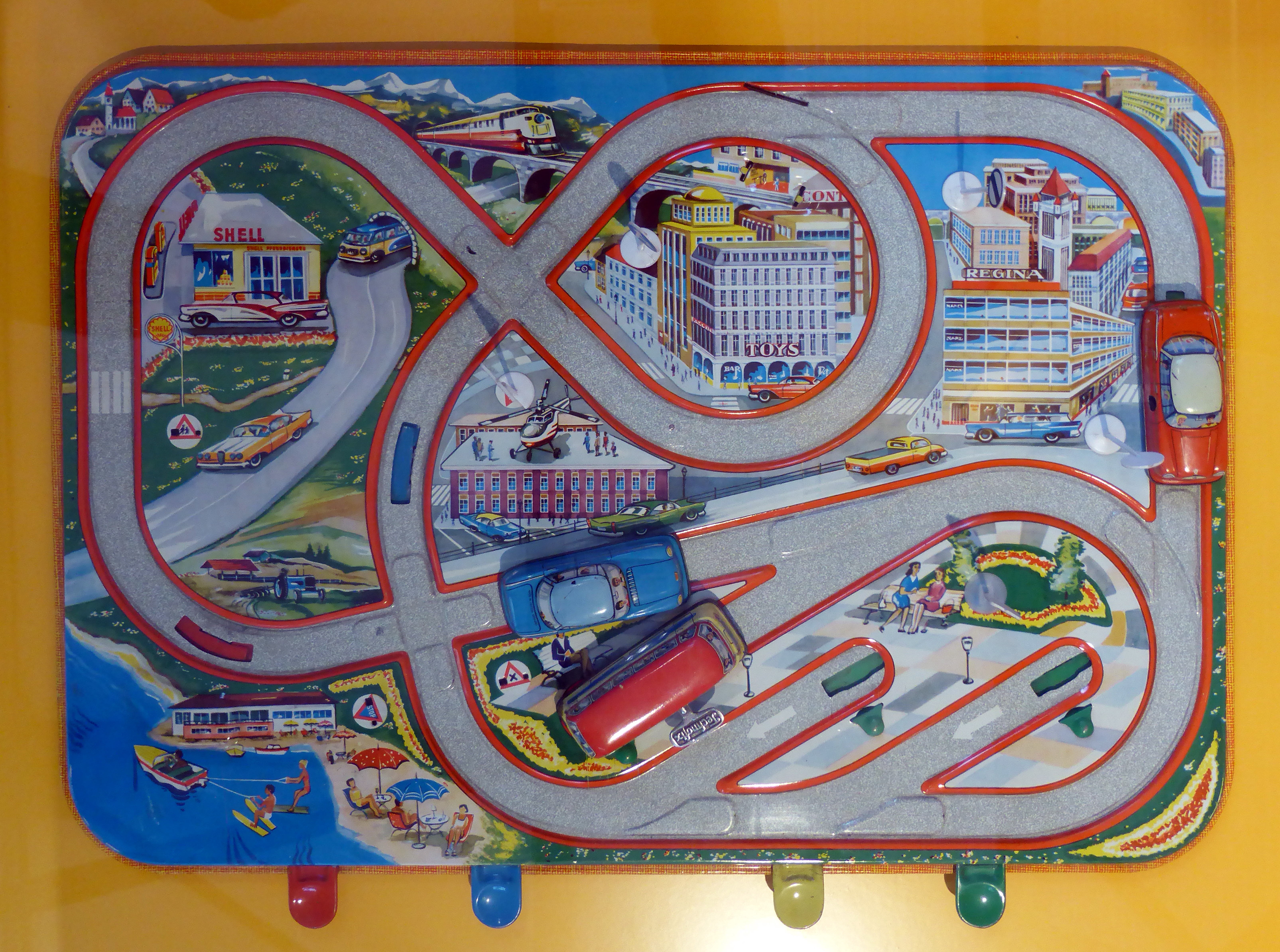 Blechspielzeug "Traffic Control" zur Verkehrserziehung von 1959 im Deutschen Technikmuseum in Berlin. Wikipedianische KulTour am 10. Oktober 2015 in der Ausstellung des Museums.